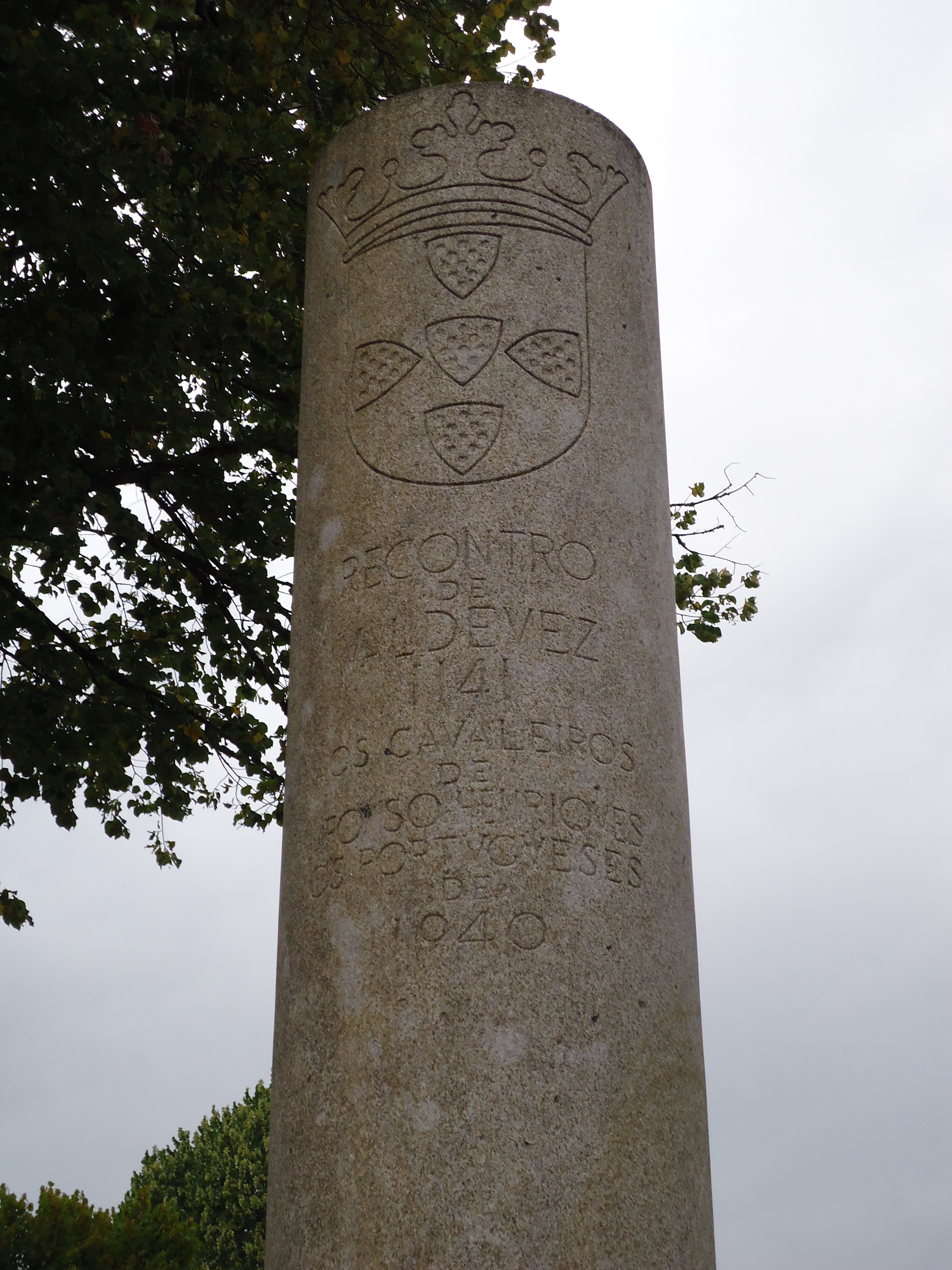 Marco evocativo ao Recontro de Valdevez (1141) erguido pelos "Portugueses de 1940", Arcos de Valdevez, distrito de Viana do Castelo, Portugal.